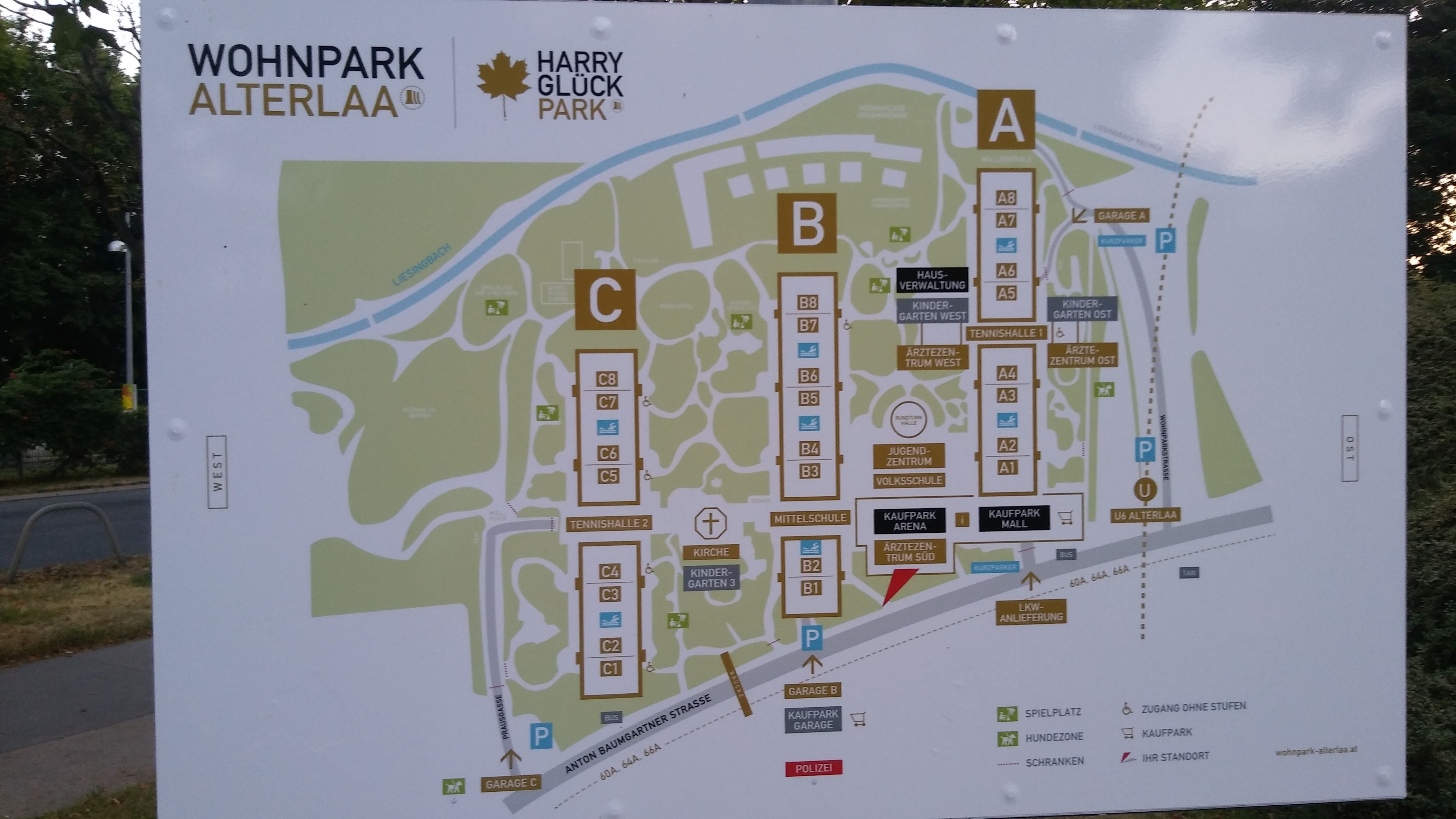 Alterlaa, niezwykłe osiedle mieszkaniowe w południowej części Wiednia